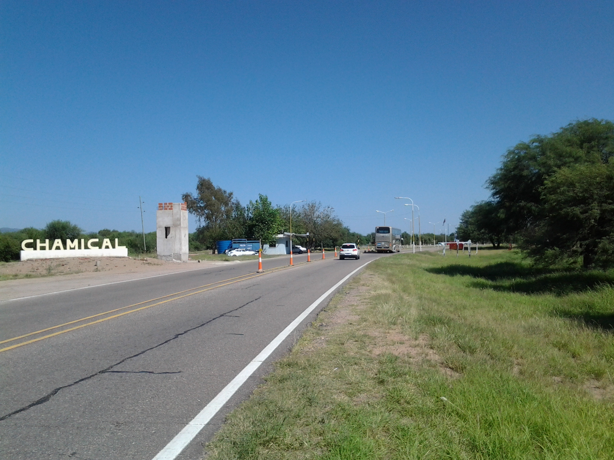 Perspectiva hacia el oeste de la ruta nacional #38 a su llegada a Chamical, un casco de poblacion en La Rioja, Argentina